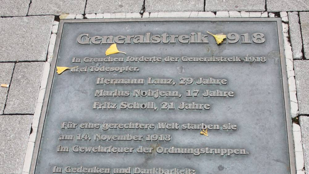 Gedenktafel für die erschossenen Arbeiter während des Landesstreiks 1918